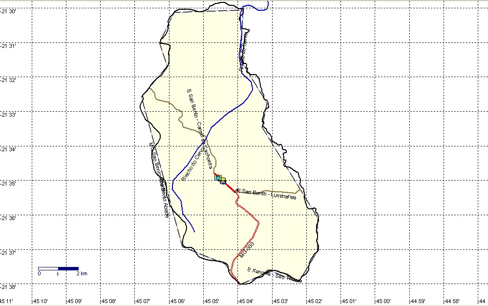 São Bento Abade Georrefenciada